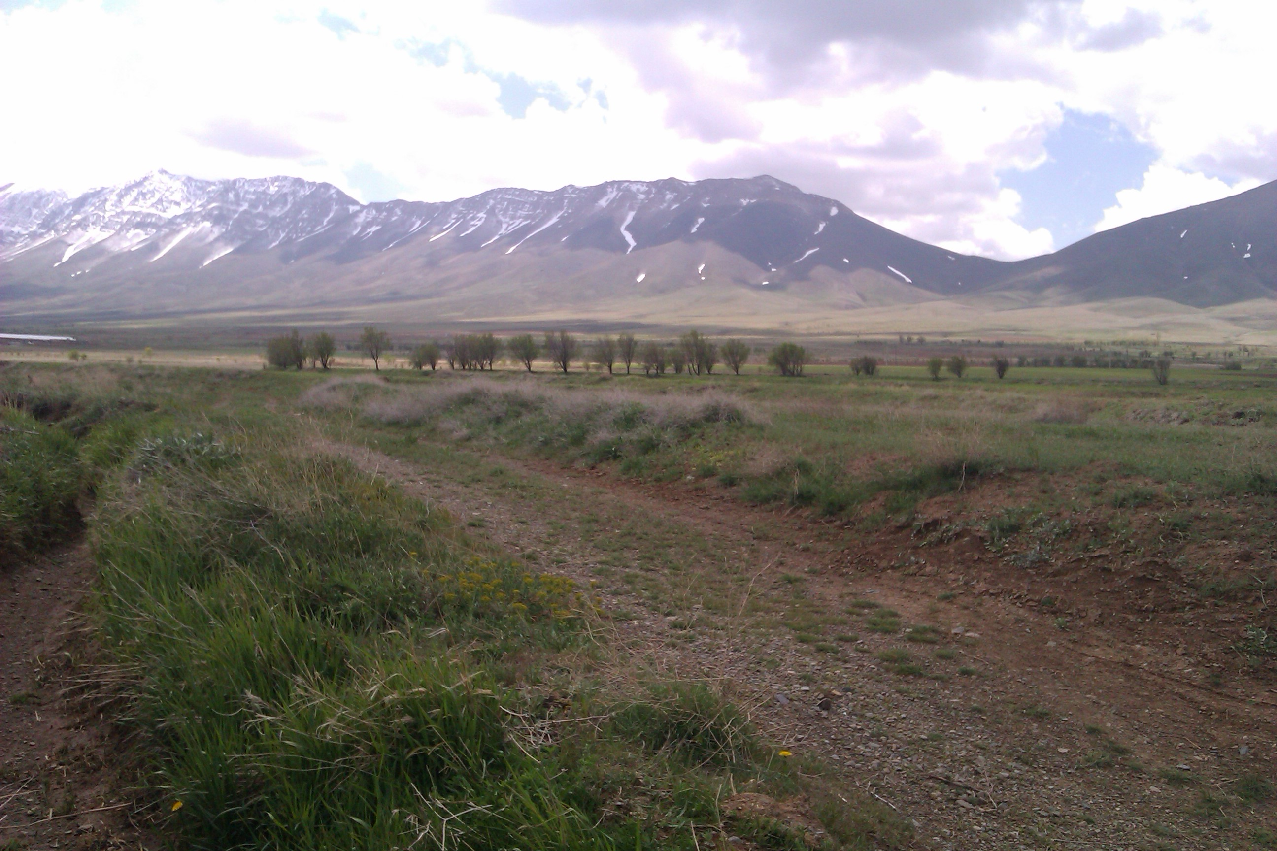 رشته کوههای کمر بسته روستای فرج آباد